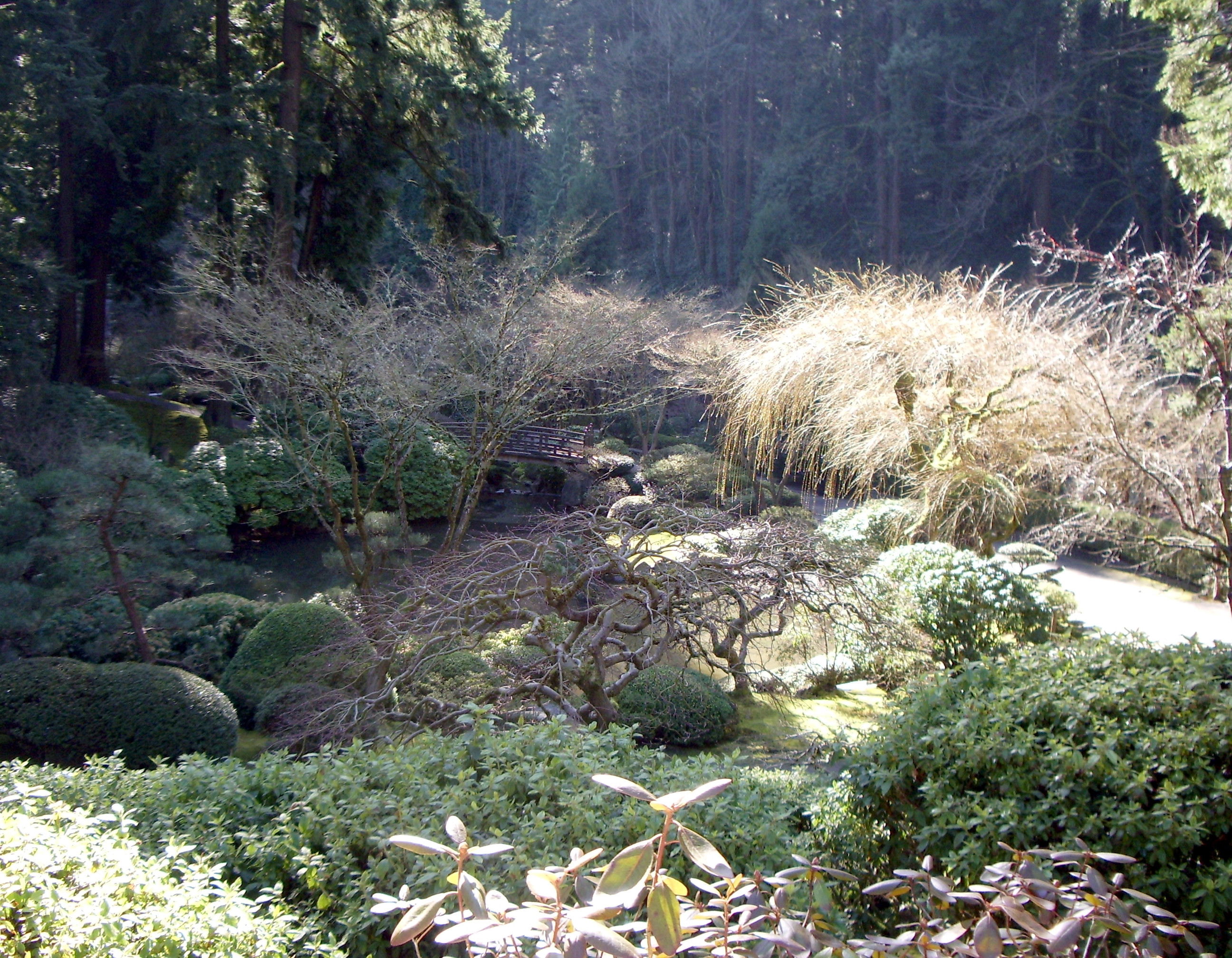 Portland Japanese Garden Winter view